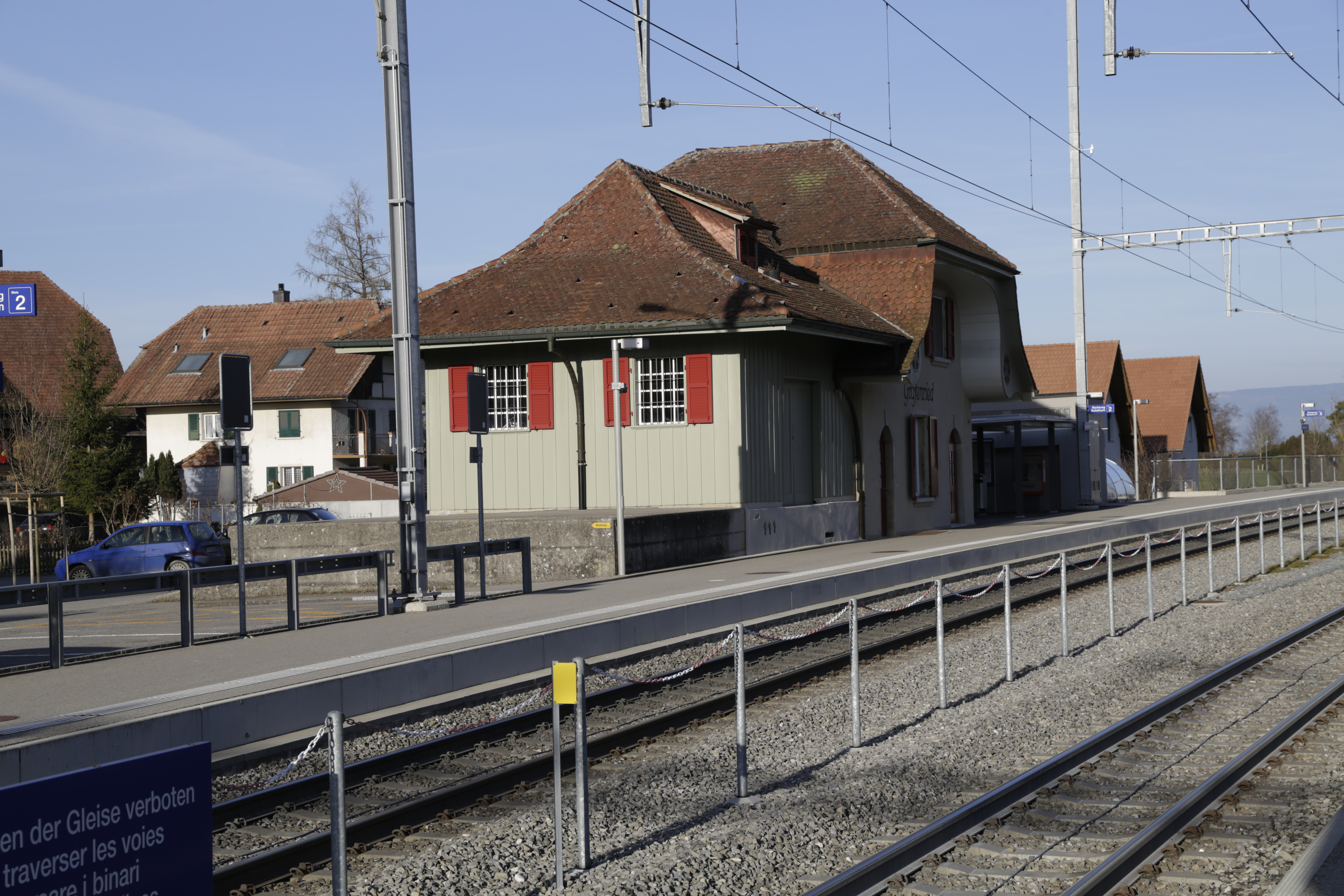 Der Bahnhof Grafenried liegt an der Bahnstrecke Bern Solothurn, und wird heute von der RBS betrieben.